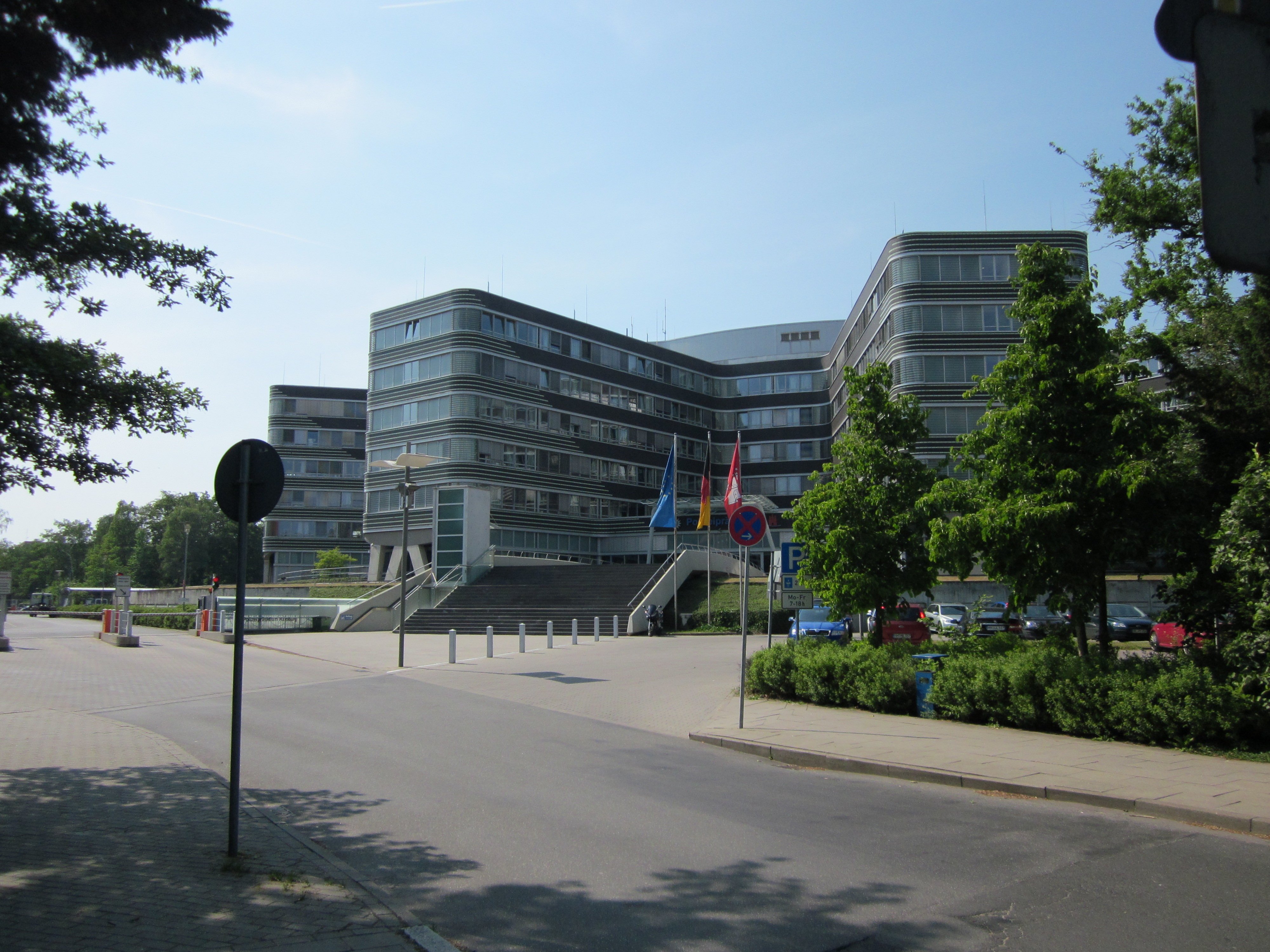 Das Polizeipräsidium am Bruno-Georges-Platz 2 in Winterhude beherbergt die Zentralen Dienststellen der Polizei Hamburg.